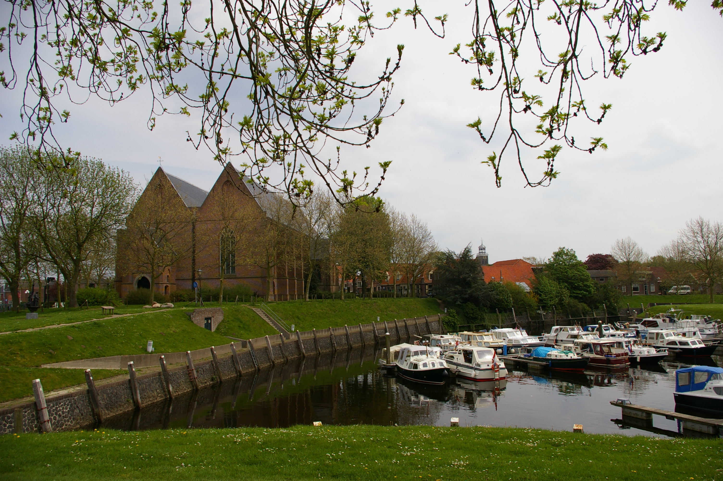 Harbour of Vollenhove, Overijssel, the Netherlands, used on Vollenhove